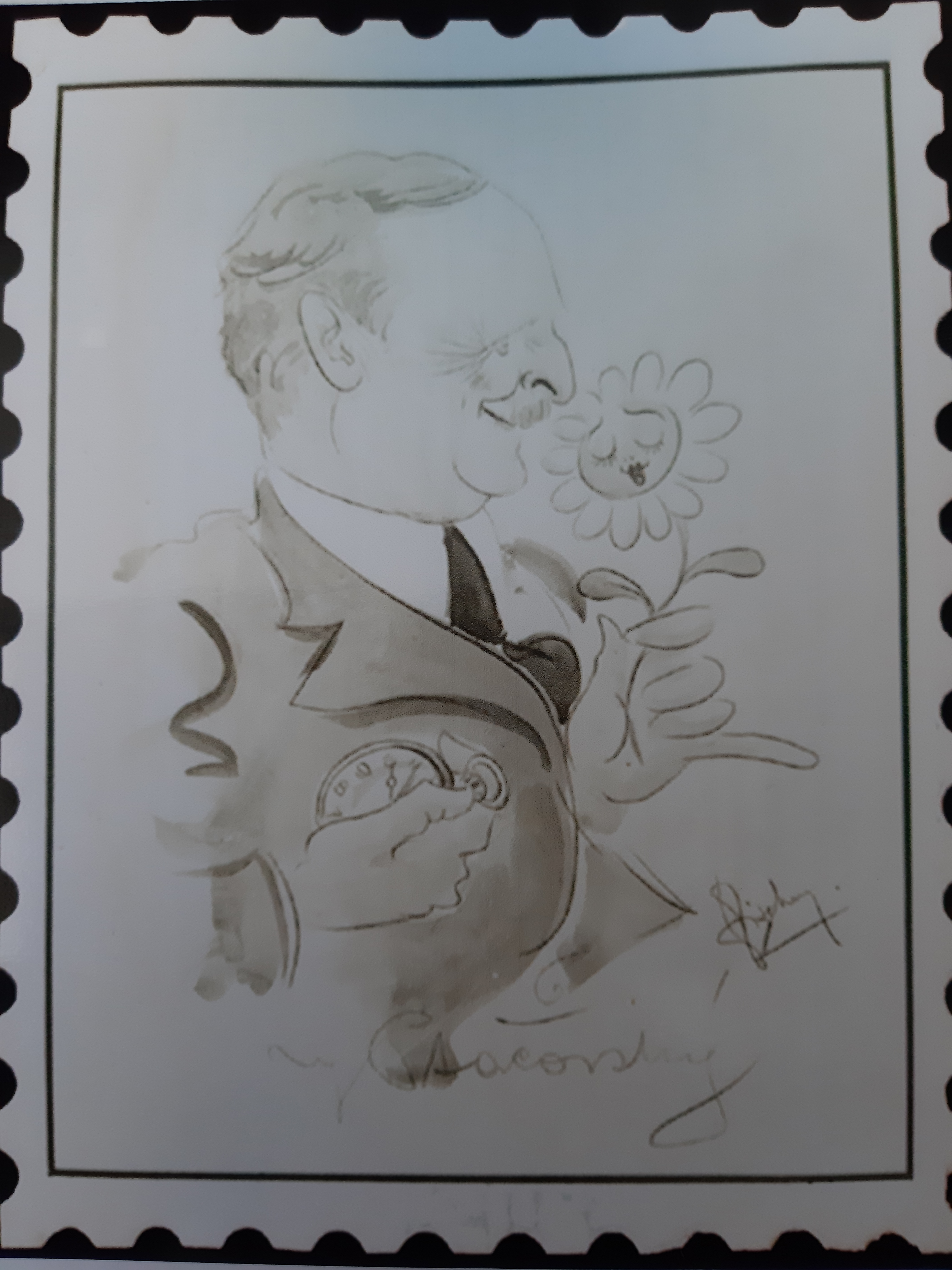 Karikatúra Jana Fischera znázorňujúca Klementa Ptačovského, ktorá bola vystavená v rámci Celoštátnej výstavy poštových známok konanej v Bratislave v roku 1937.